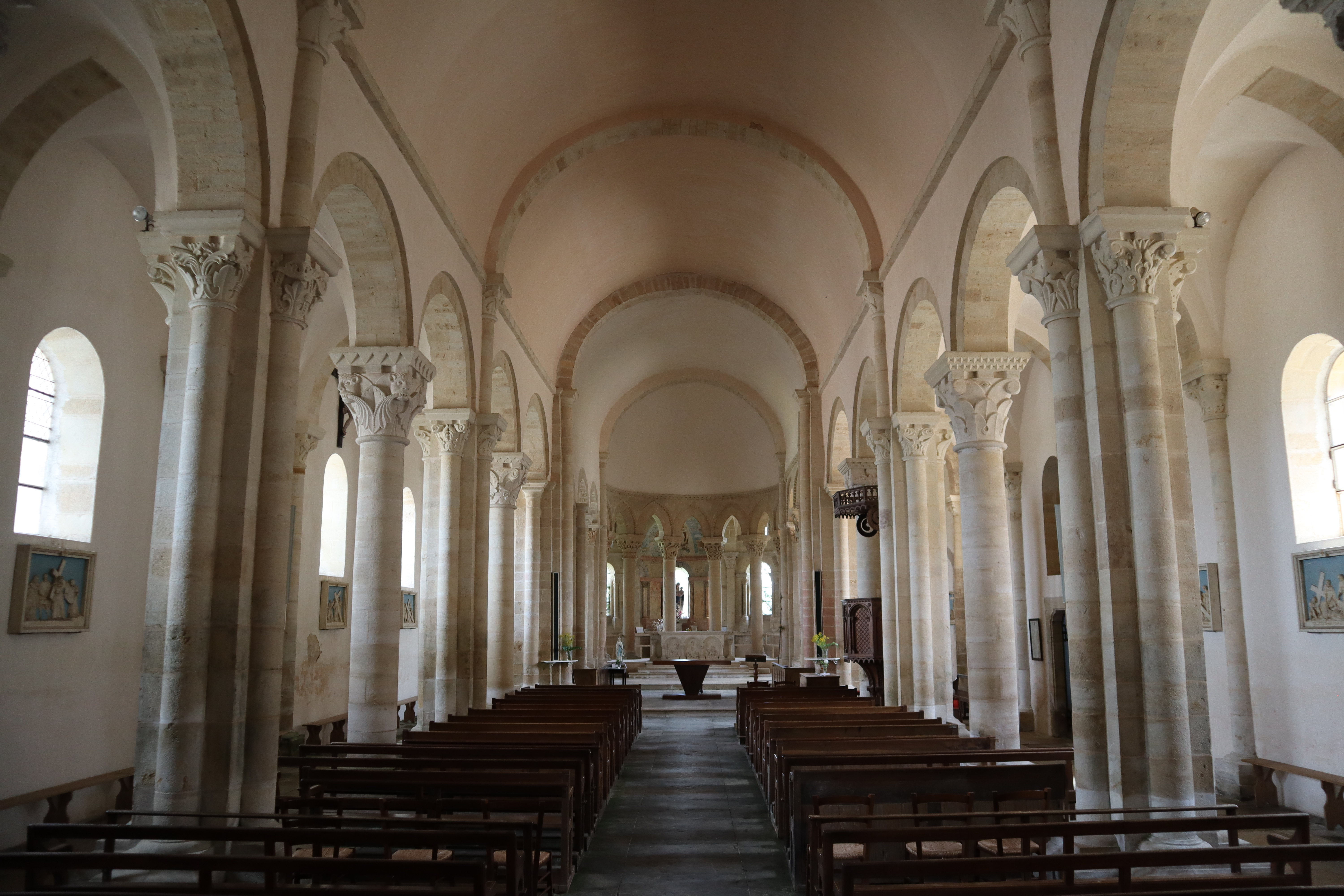 Église de Saint-Révérien (58). Intérieur.